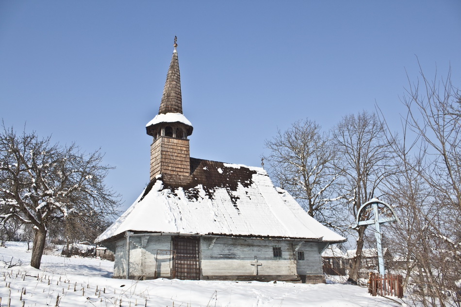 Biserica de lemn din Zalnoc, judeţul Sălaj.